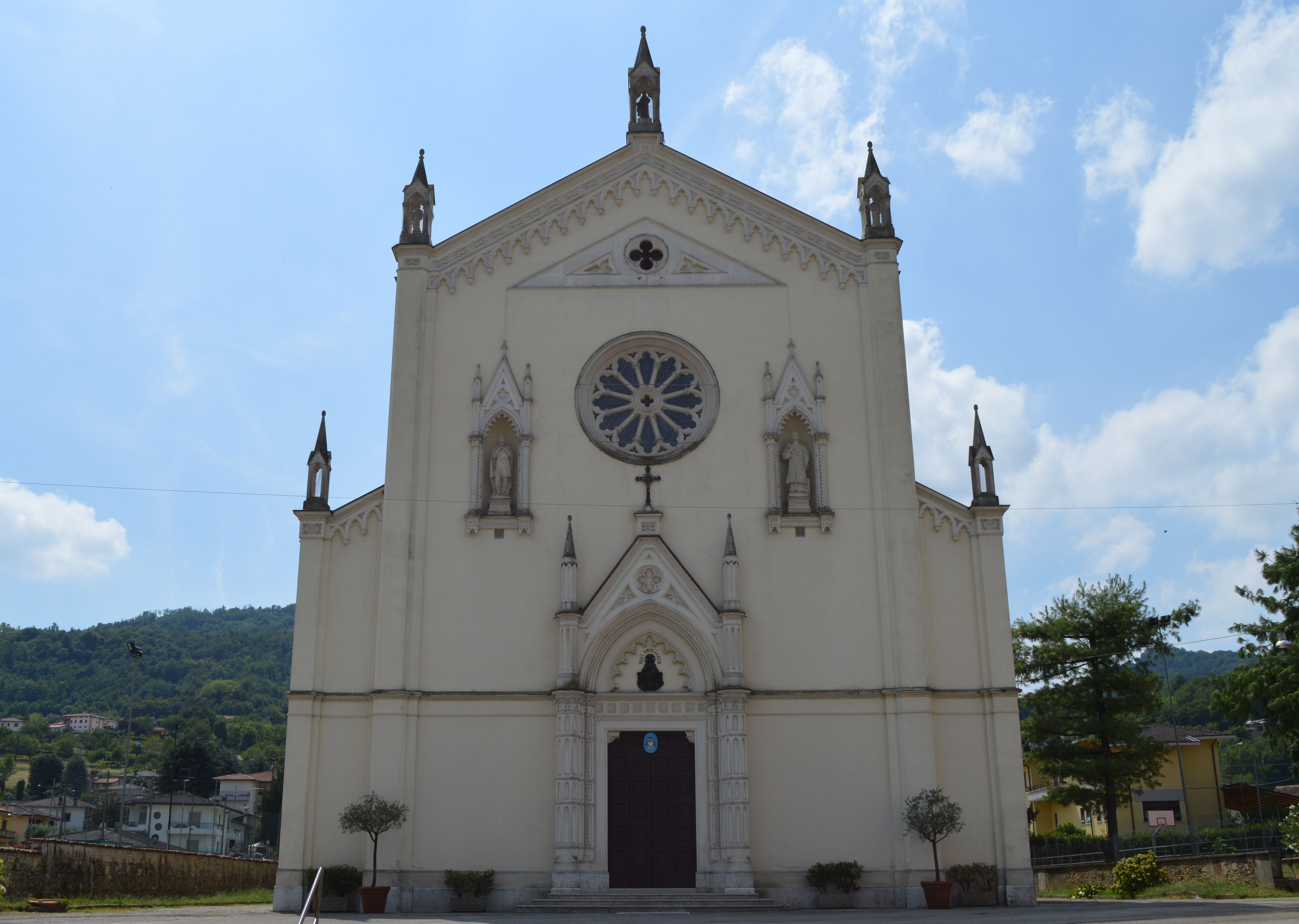 Facciata della chiesa parrocchiale di San Vitale a Castelnovo di Isola Vicentina in provincia di Vicenza.